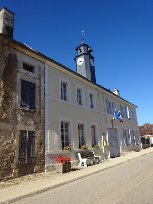 MAIRIE DE RUGNY